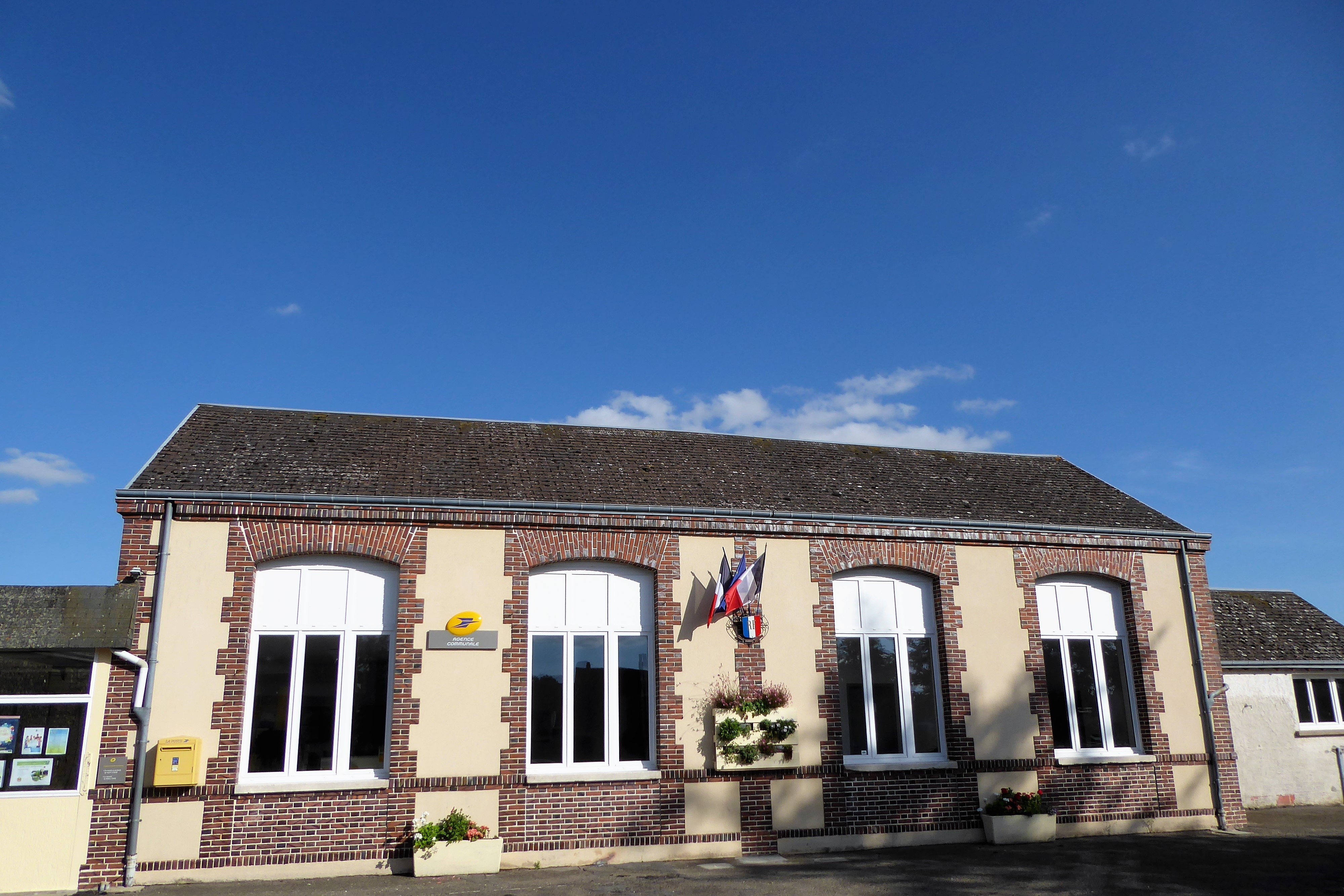 mairie, Magny, Eure-et-Loir (France).